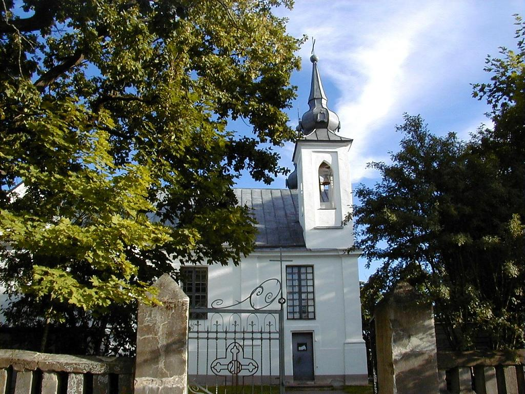 Kaunatas katoļu baznīca 2002-08-10